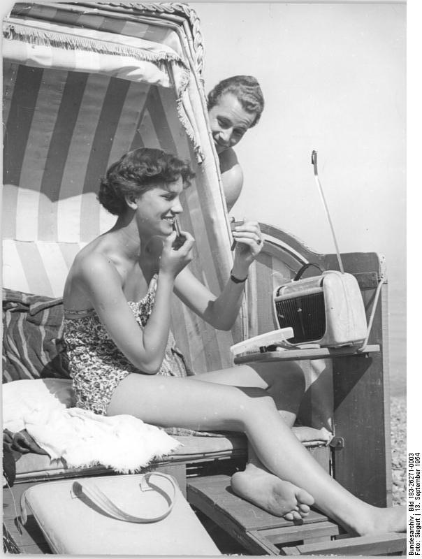 Zentralbild-Siegert Wjt-Ho. 3 Motive 13.9.1954 Abschied vom Strand werden bald diese beiden Sonnenhungrigen nehmen. Sie weiss, wenn die Sonne nicht mehr brennt, wo sie die "Farbe" hernimmt. "